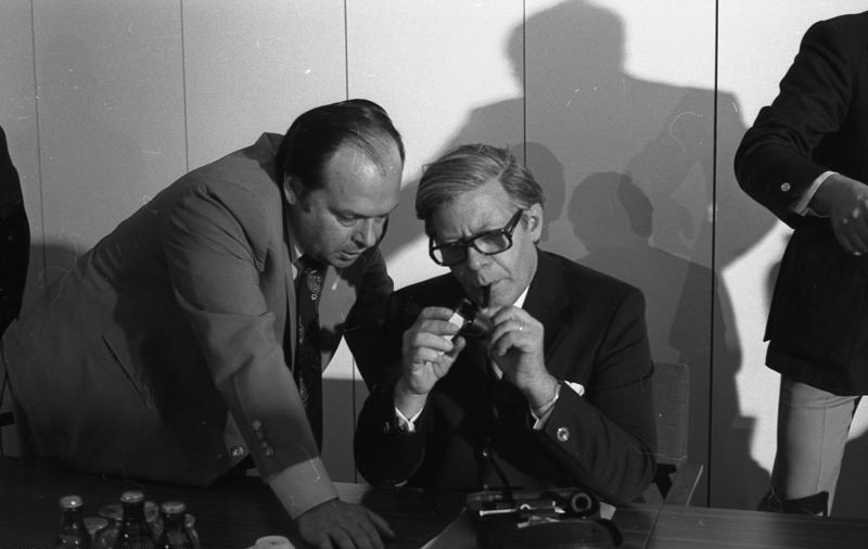 Sitzung des SPD-Präsidiums in der Friedrich-Ebert-Stiftung, Bonn (links Karl Wienand, rechts Helmut Schmidt)